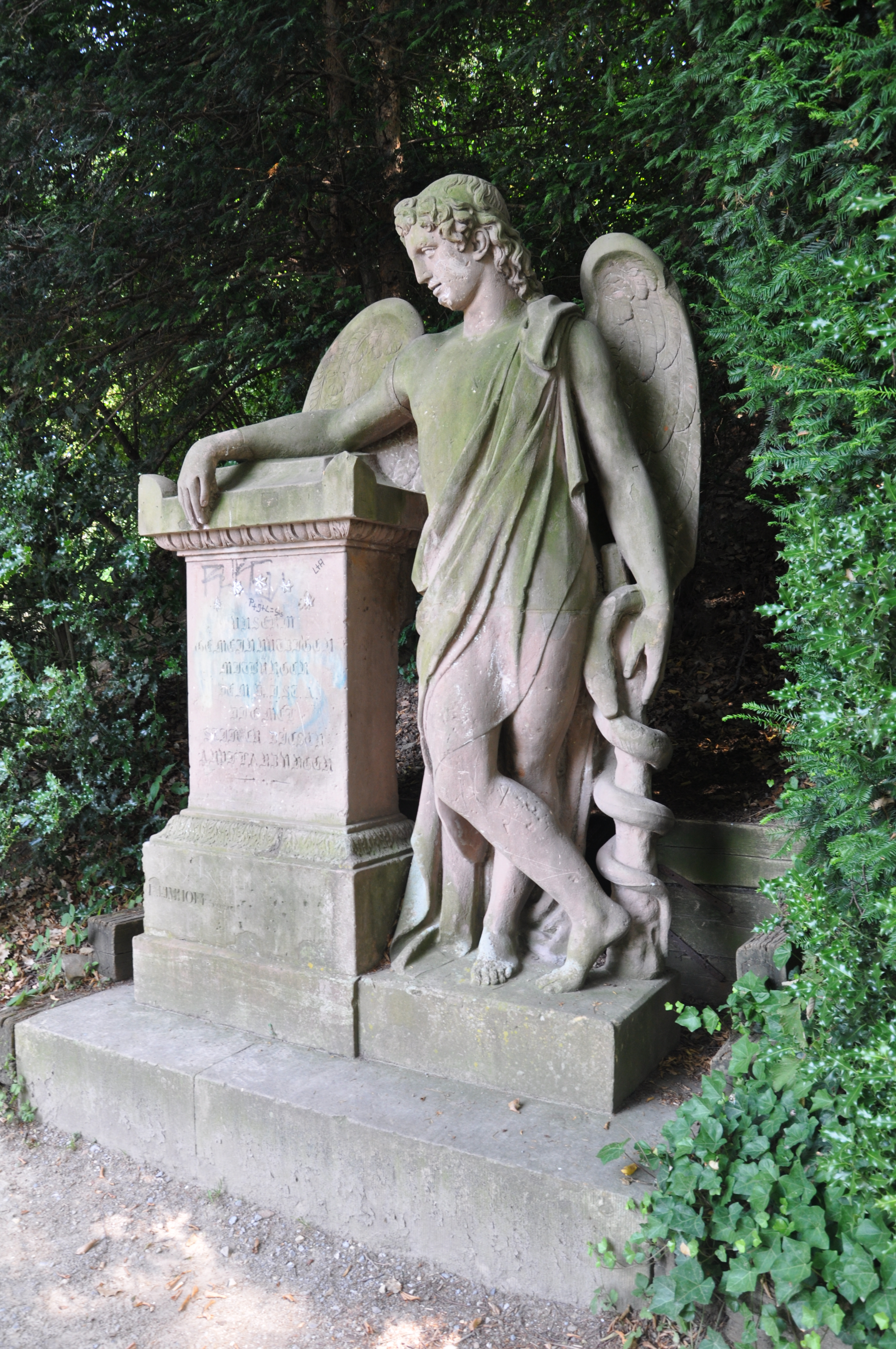 Hardt, WuppertalThis is a photograph of an architectural monument.